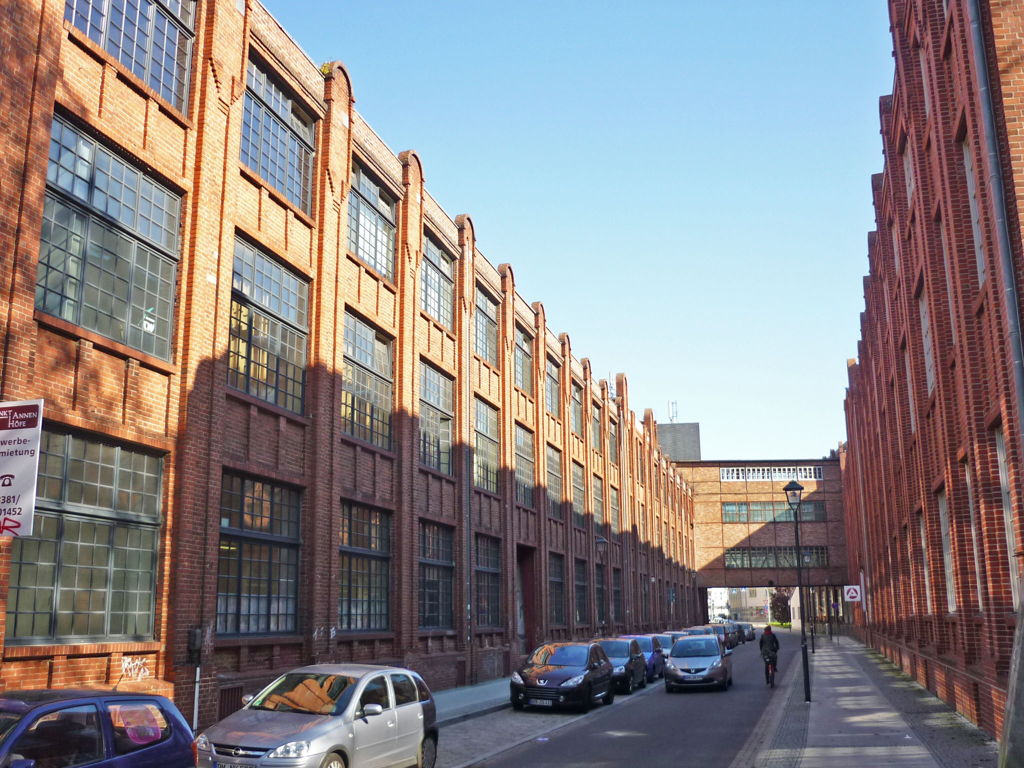 Brandenburg (Havel), ehem. Brennaborwerke in der Kirchhofstraße